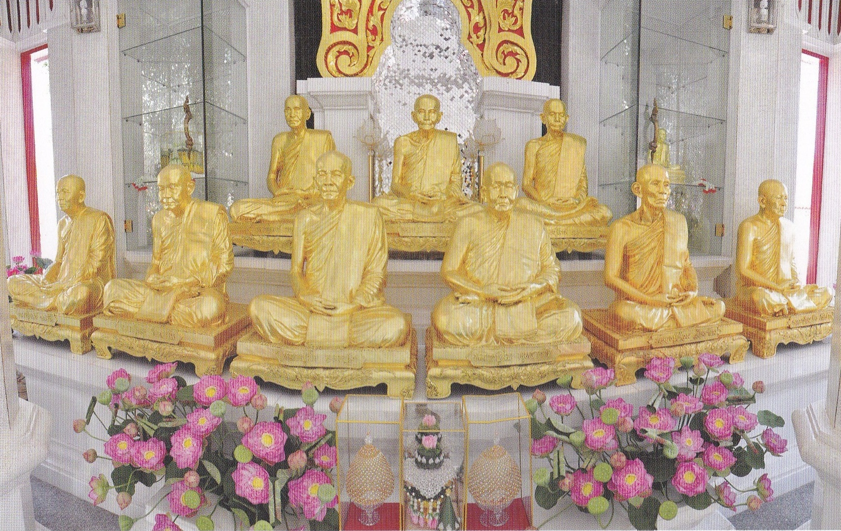 รูปเหมือนบูรพาจารย์ประดิษฐานในพระมหาเจดีย์บูรพาจารย์ วัดป่าวิเวกธรรม